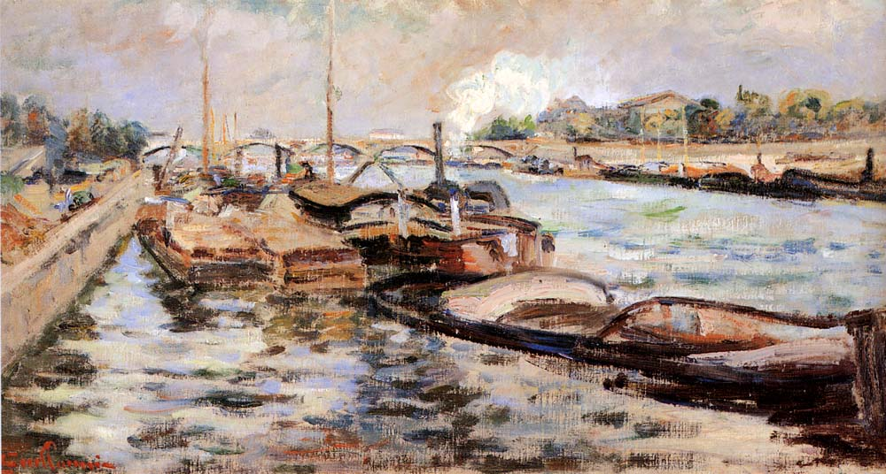 The Seine